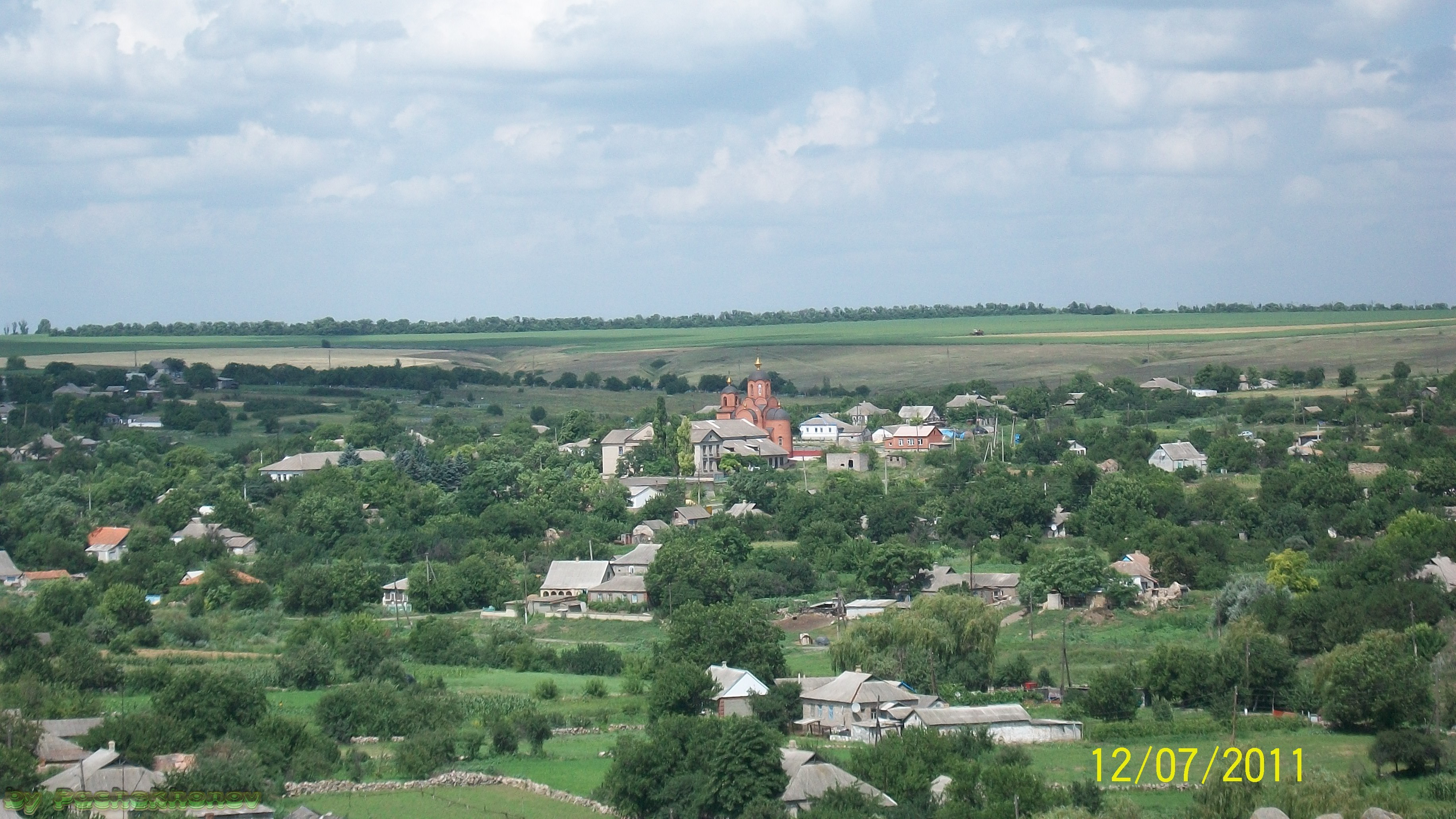 Живописная природа села Стыла